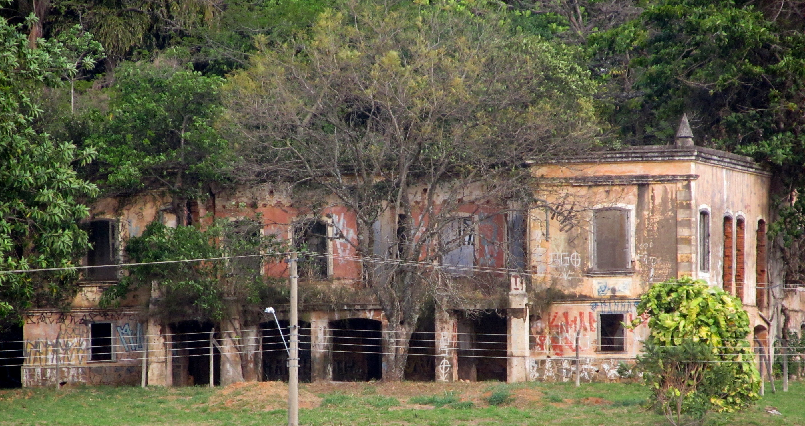 Antiga sede da Fazenda Jambeiro